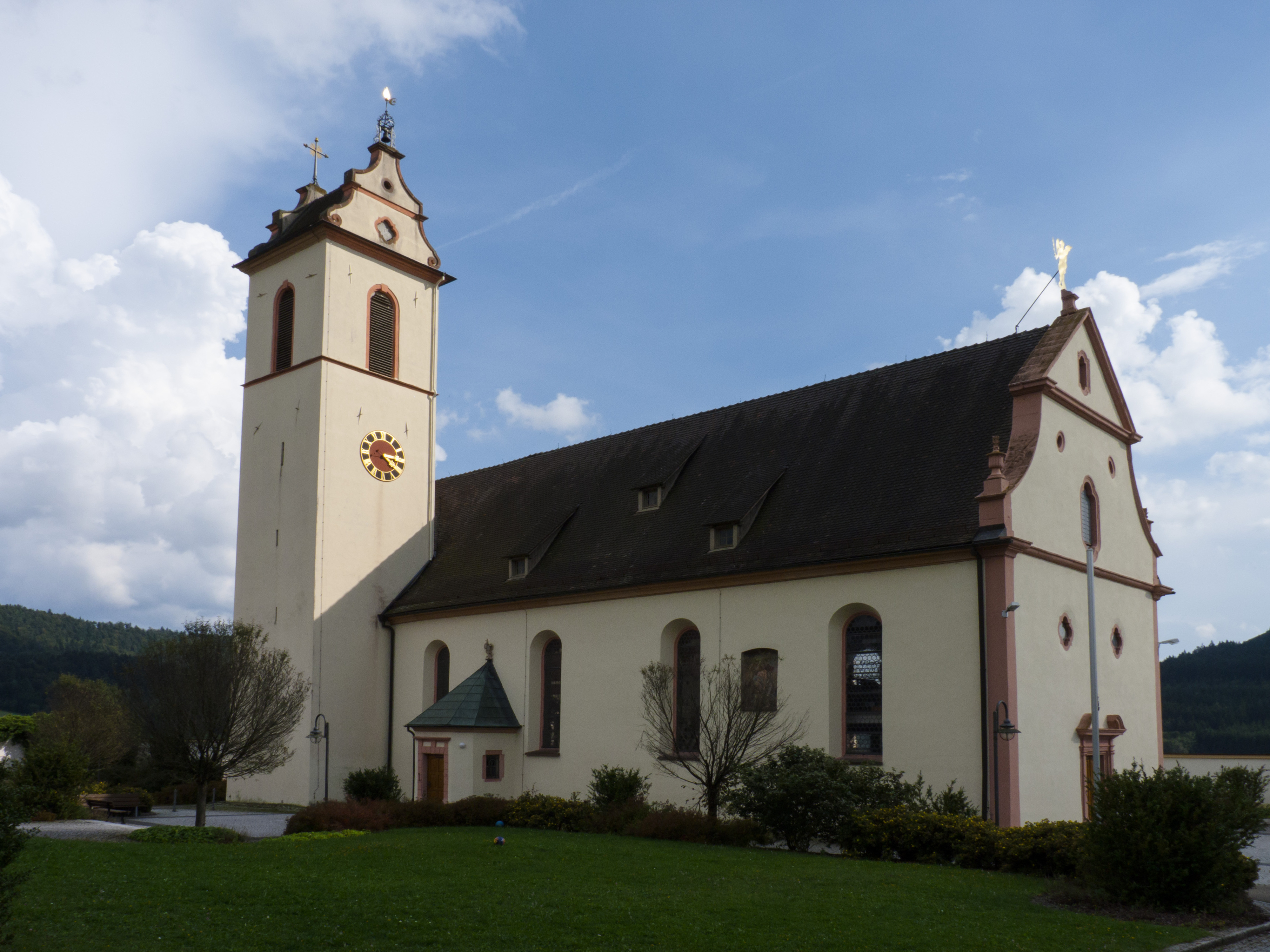 Katholische Kirche Maria Himmelfahrt in Seitingen-Oberflacht